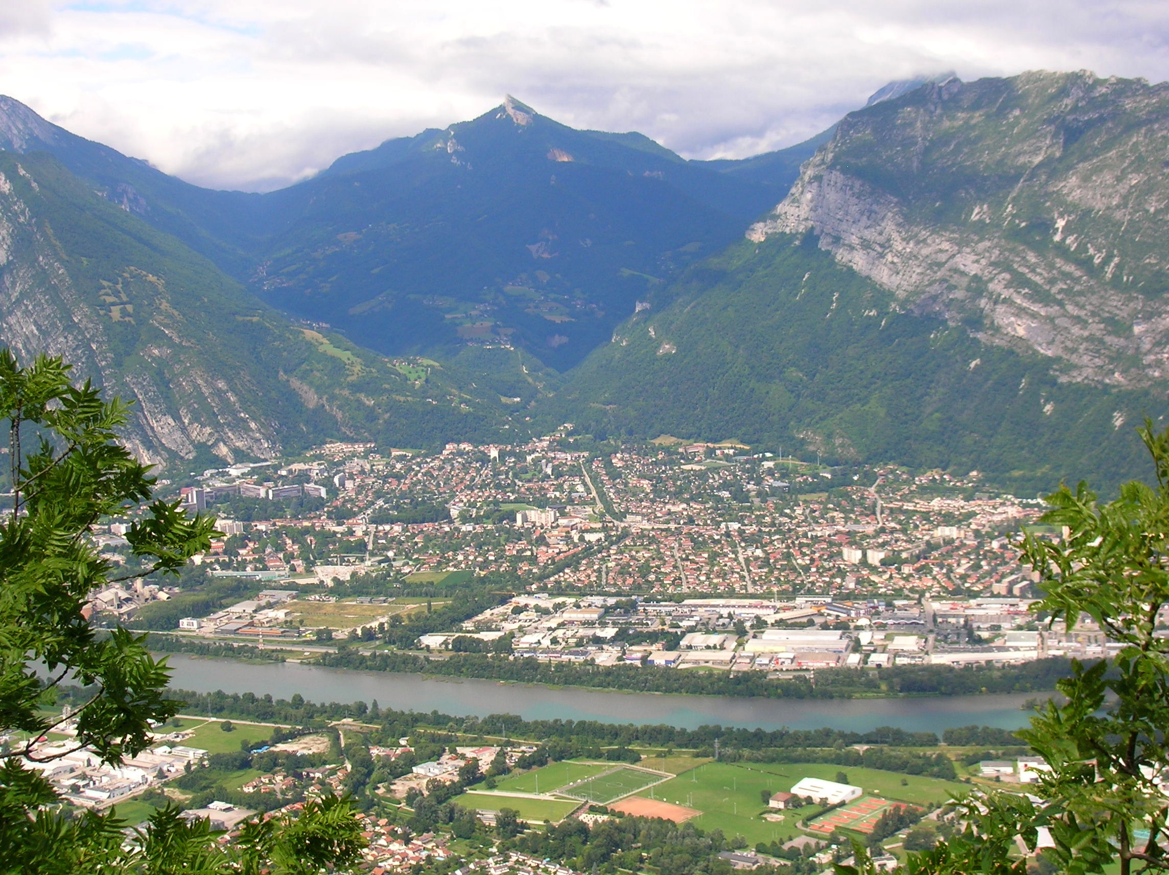 Saint-Égrève vue depuis La Poye (Fontaine) chemin pour la Ferme Durant. Saint-Égrève, Isère, Rhone Alpes, France.